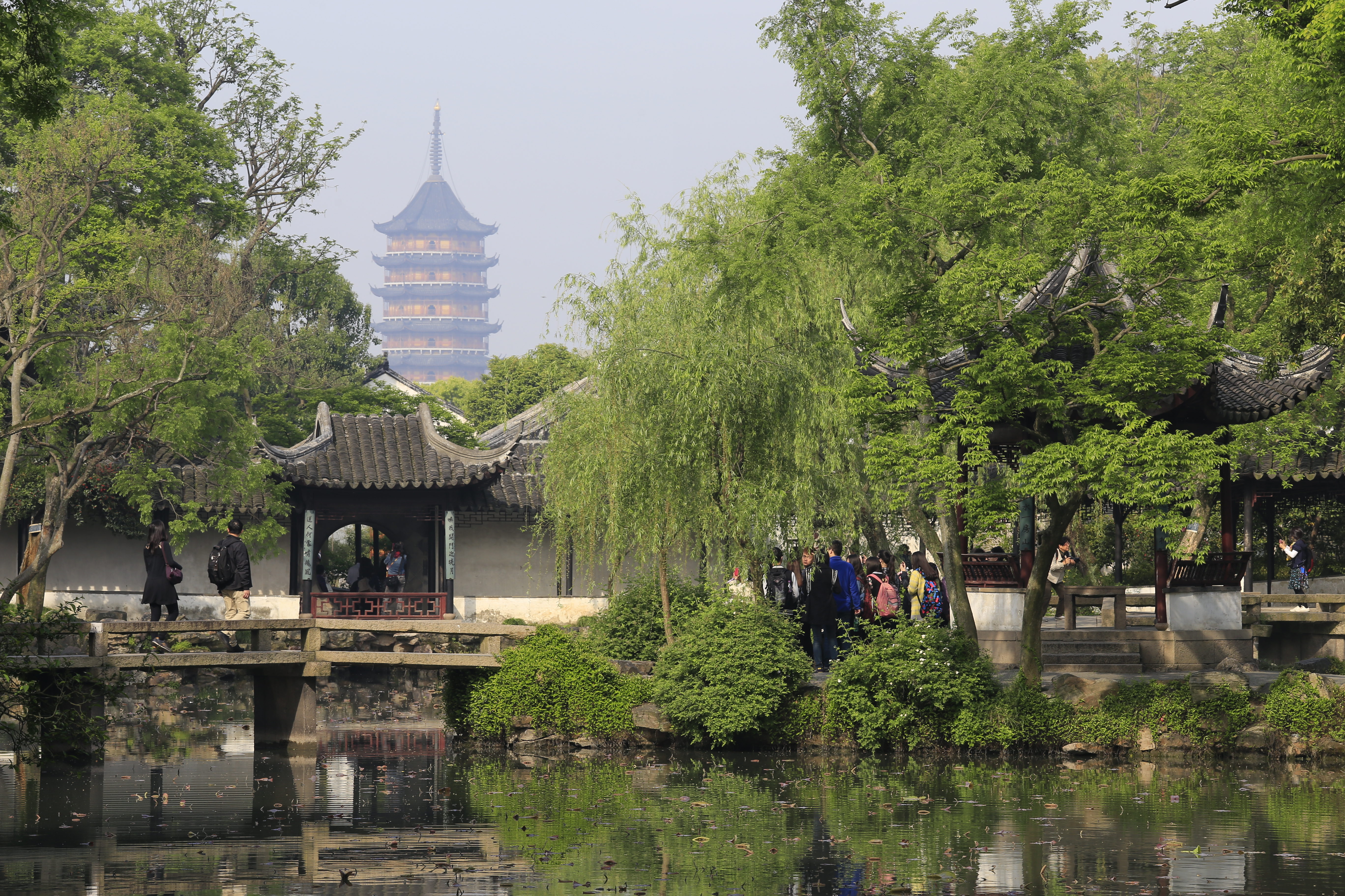 苏州拙政园—— 中部——“梧竹幽居”西望，近处为“别有洞天”，右侧为荷风四面亭，远处为报恩寺塔